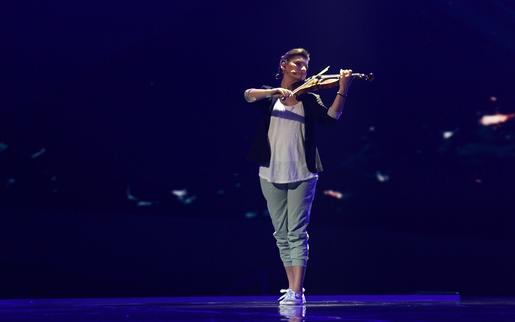 Ksenija Milosevic